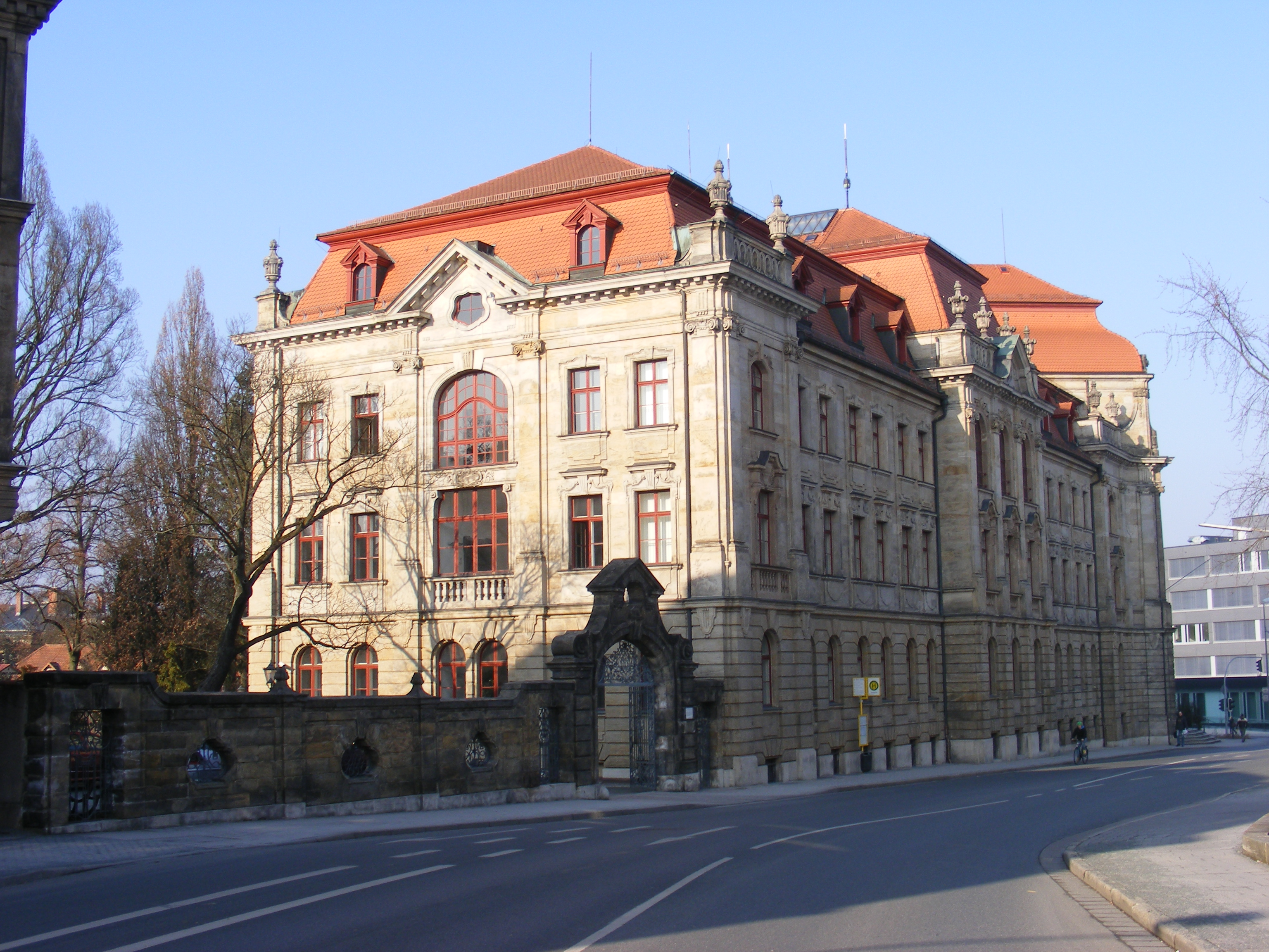 Bayreuth - Justizpalast (Außenansicht).